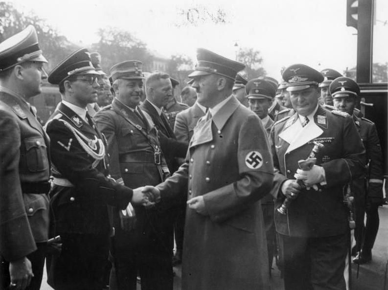 Des Führers Rückkehr von den Münchener Besprechungen Der Führer begrüßt auf dem Bahnsteig des Anhalter Bahnhof seine Mitarbeiter. UBz: v.r.n.l. Reichsminister Graf von Schwerin-Krosigk, Reichminister Kerrl, Reichsminister Rust, Reichsleiter Bouhler, Reichsjugendführer Baldur von Schirach, rechts Generalfeldmarschall Göring und Reichsminister Dr. Goebbels. Fot.: 1.10.38 12946-38 Information added by Wikimedia users.Returning to Berlin after the Munich Agreement, Hitler is greeted by his collaborators on the railway platform